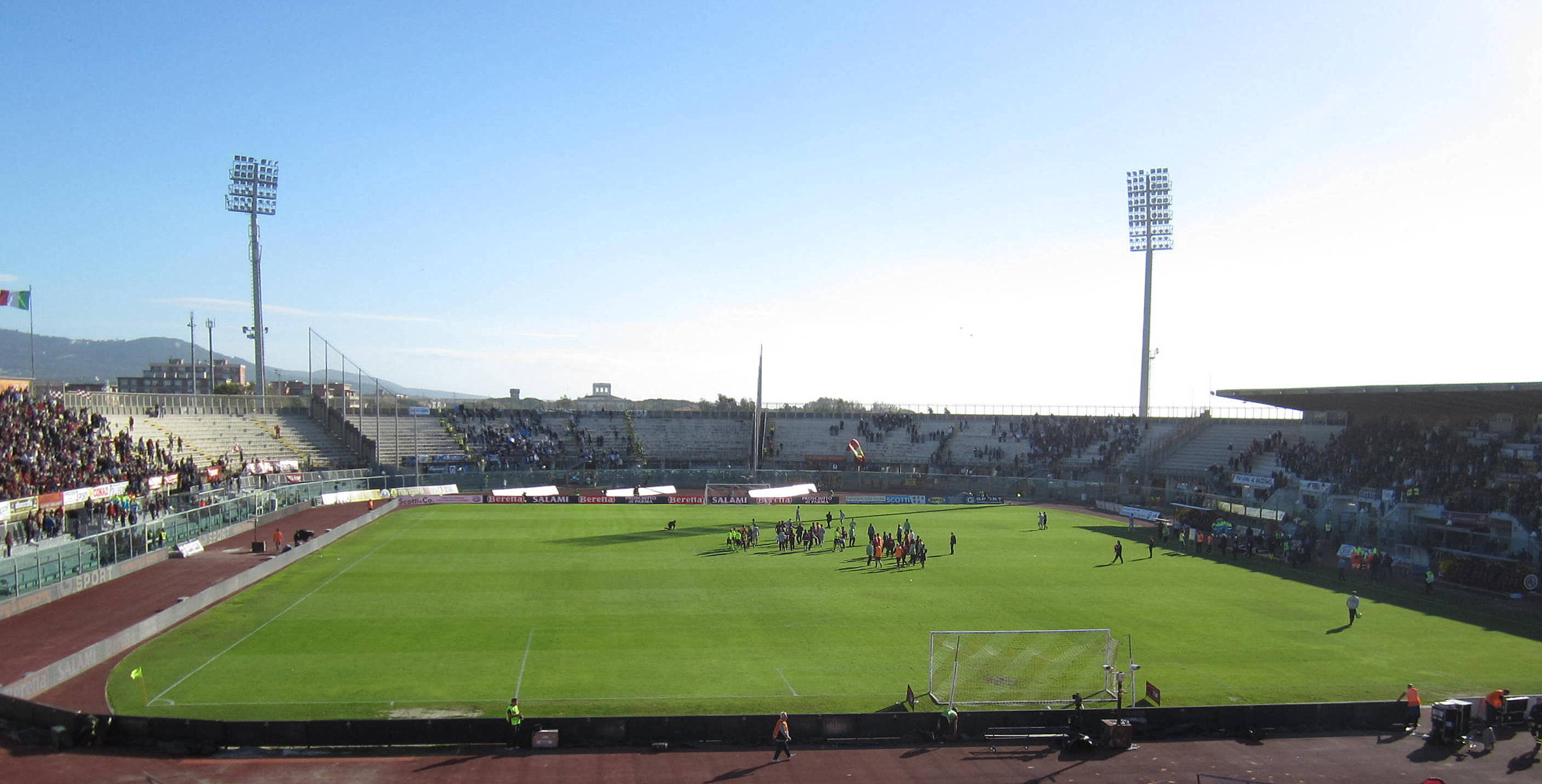 Stadio Armando Picchi, Livorno, alla fine della partita Livorno - Atalanta, vinta dagli Amaranto per 1-0